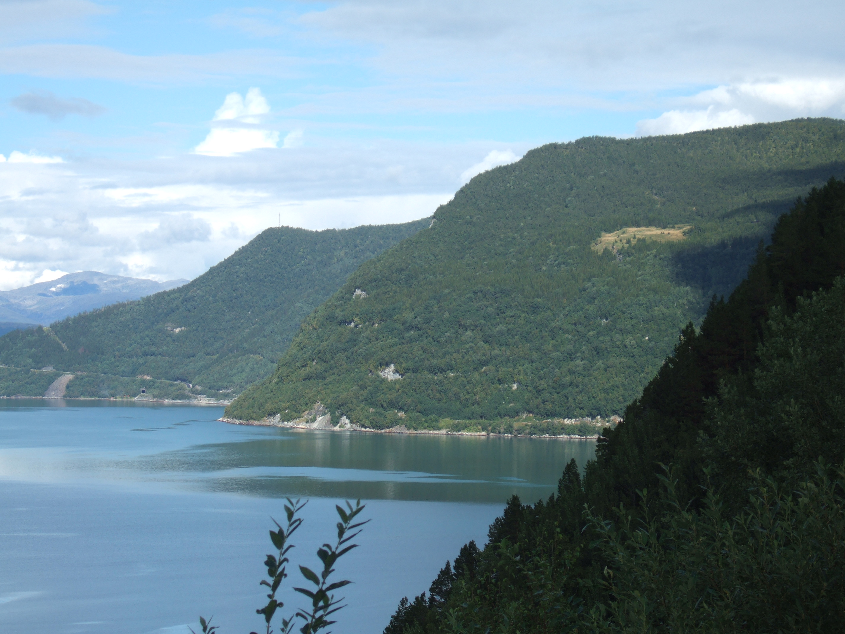 Den fraflyttede gården Kvænflåget i Saltdal kommune i Nordland. Selve boplassen lå på gressflaten i fjellsiden litt til høyre for senter av bildet.